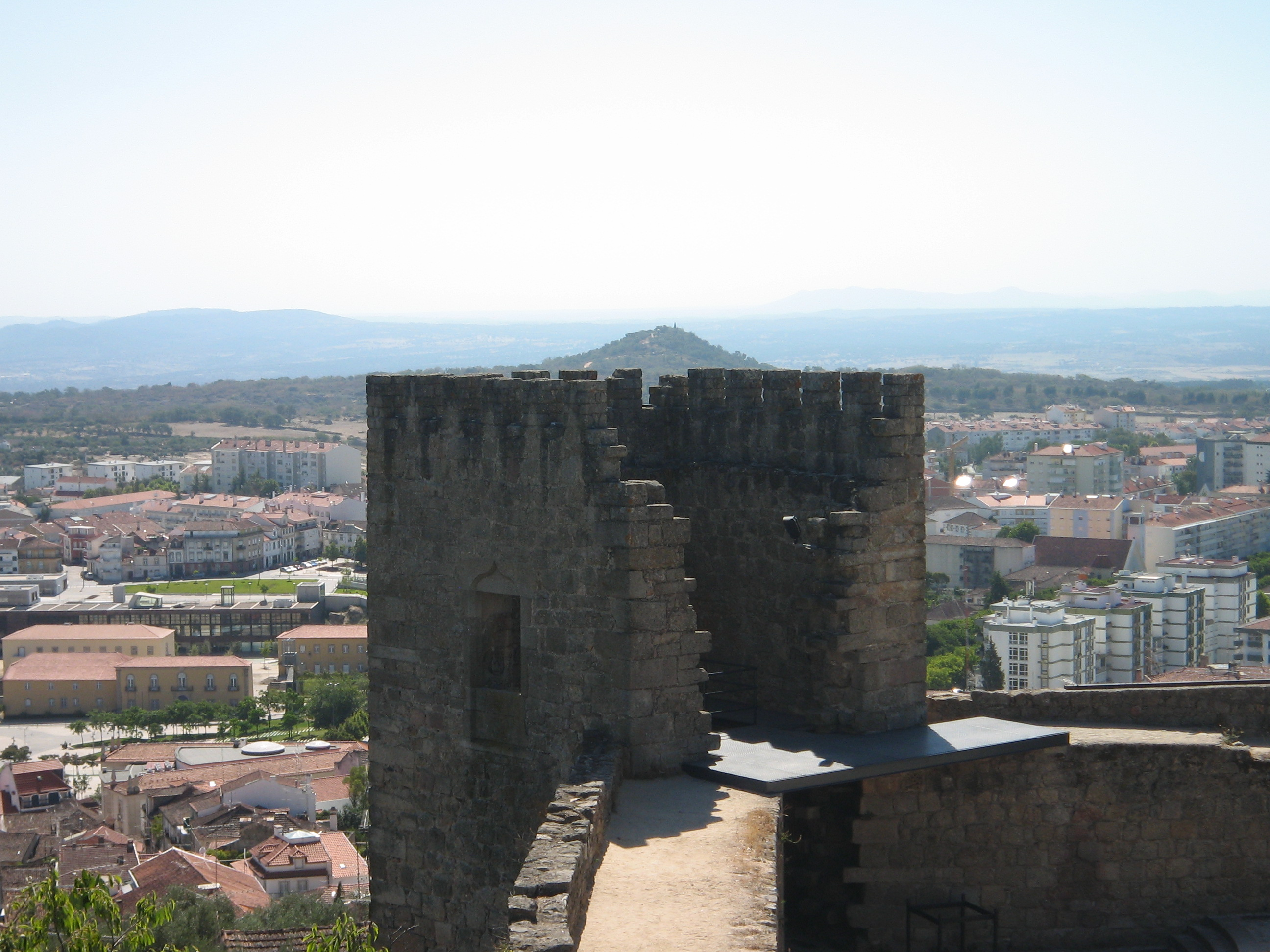 Torre e cidade de Castelo Branco. This monument is classified as Sem protecção legal. This file was uploaded for Wiki Loves Monuments in Portugal with the unique identifier 71175.